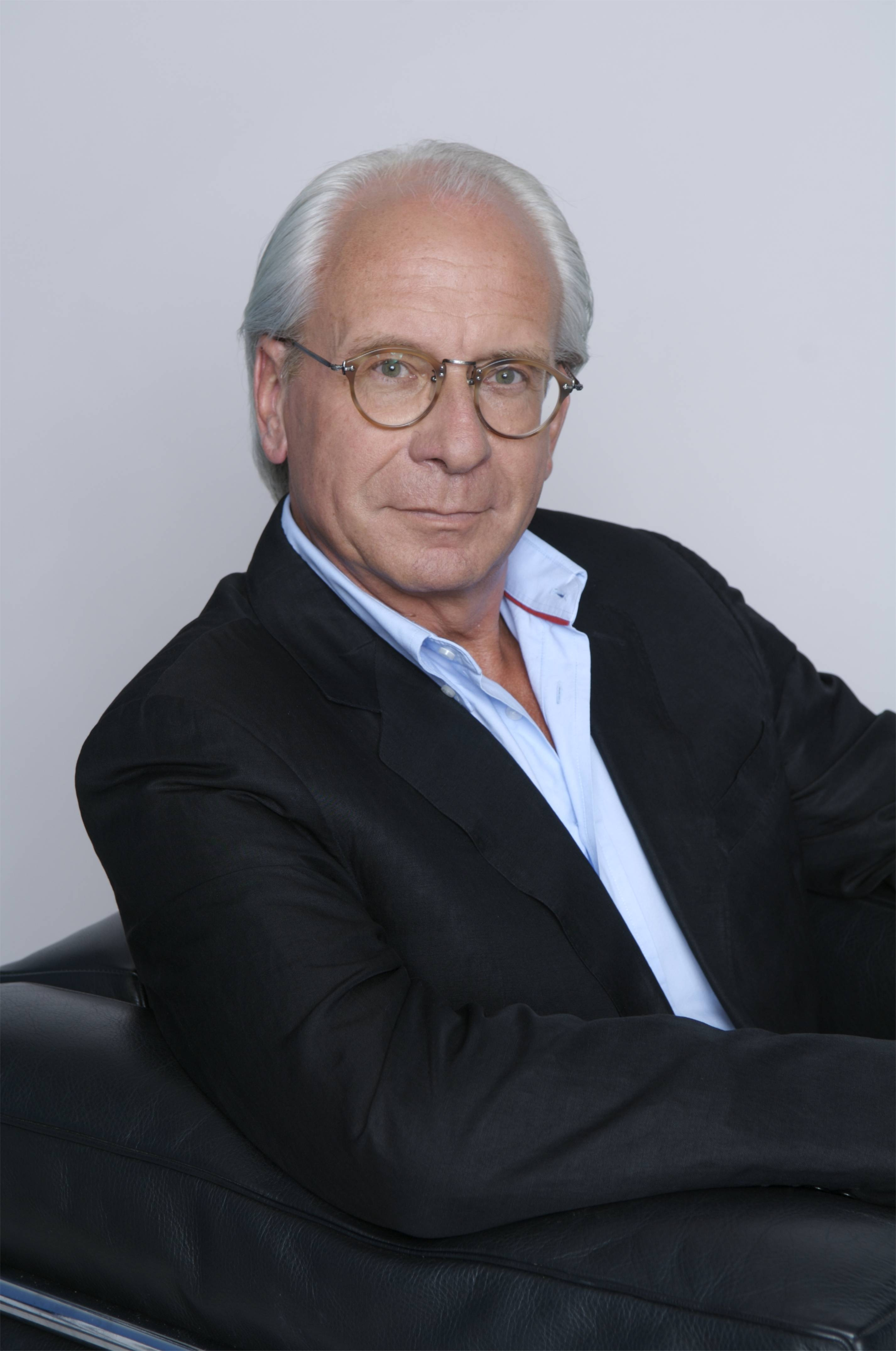 Wolf Bauer, Produzent, Vorsitzender der Geschäftsführung der UFA Film & TV Produktion und Geschäftsführer der UFA Cinema